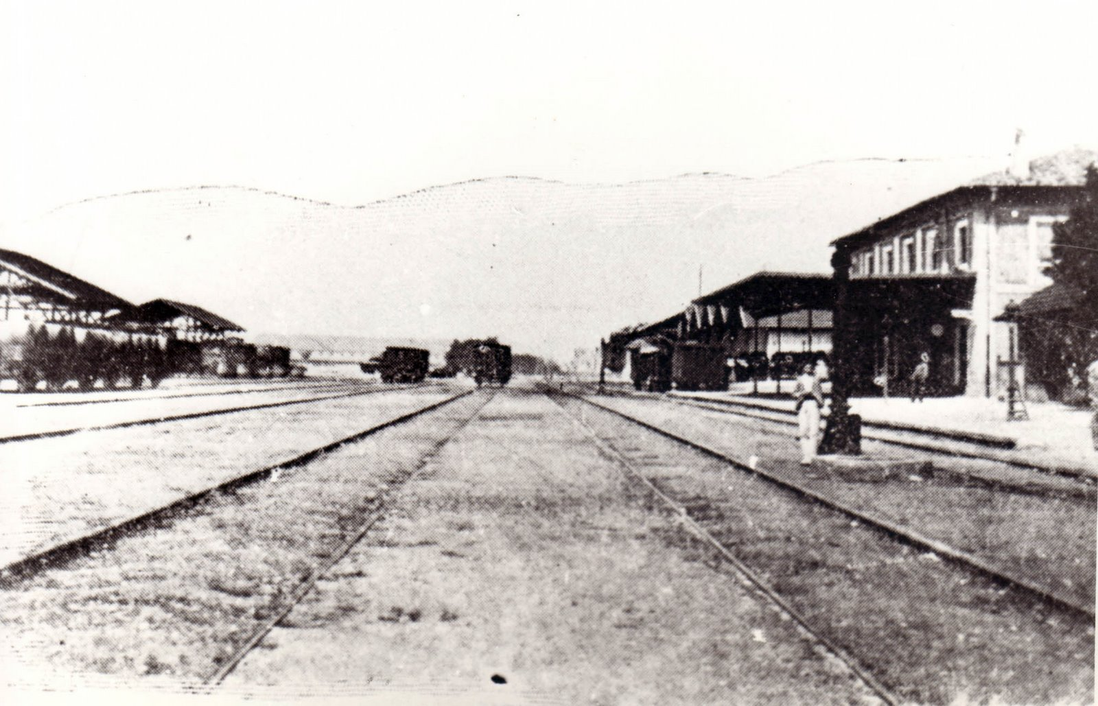 Estación MZA de Villena el año de su inauguración